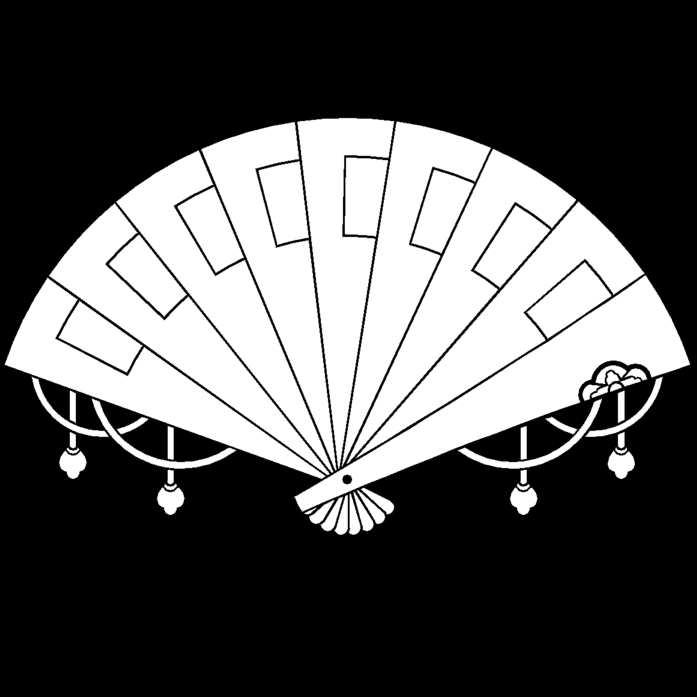 日本の家紋の一種である檜扇紋の一例（檜扇:ひおうぎ/hiougi）